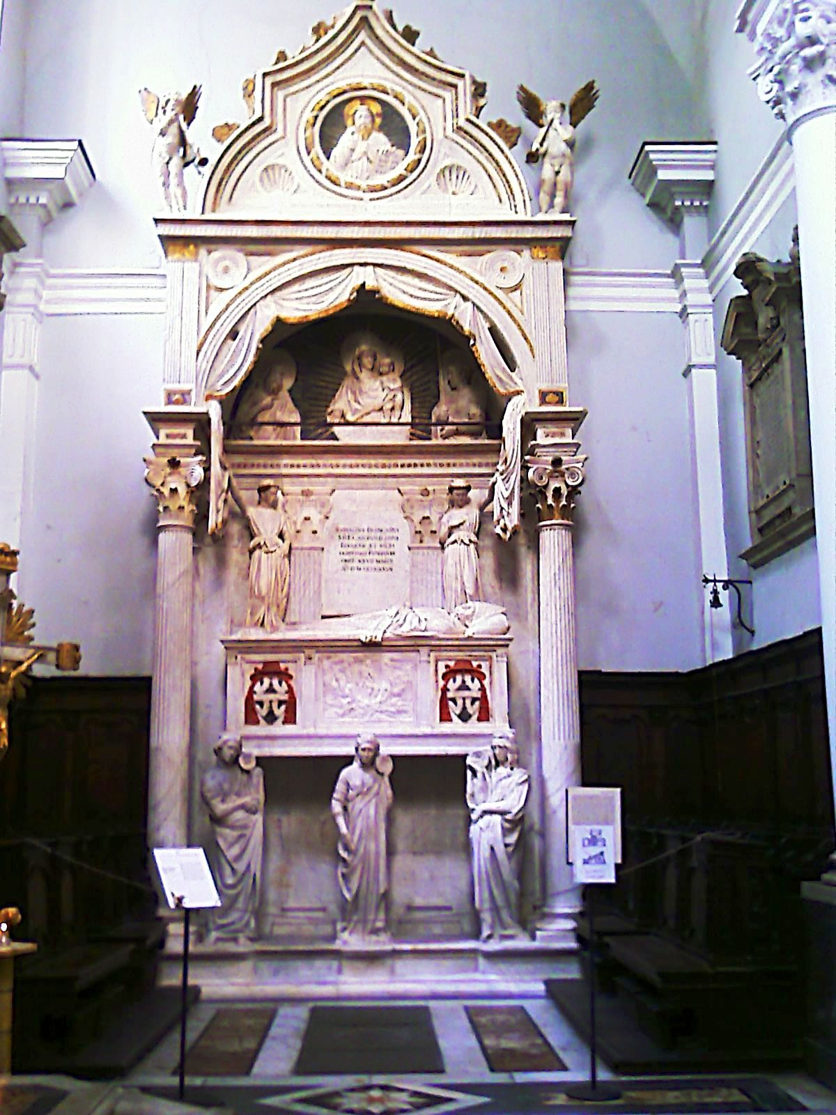 Napoli - Chiesa di Sant'Angelo a Nilo - Brancaccio's Grave